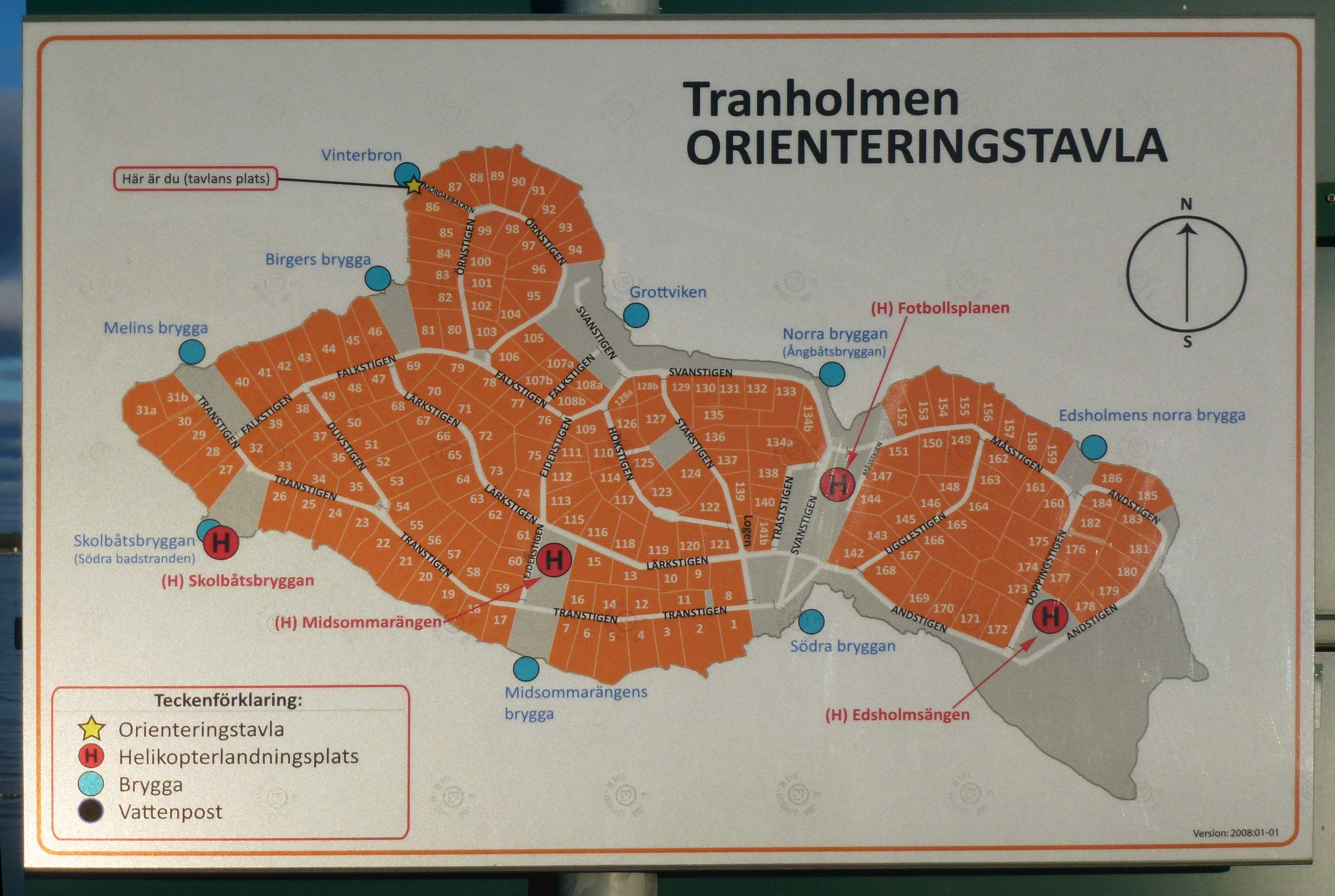 Tranholmen, skylt